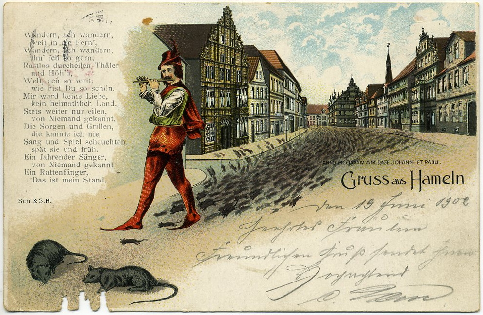 Litho Gruss aus Hameln - Wandern, ach wandern ...